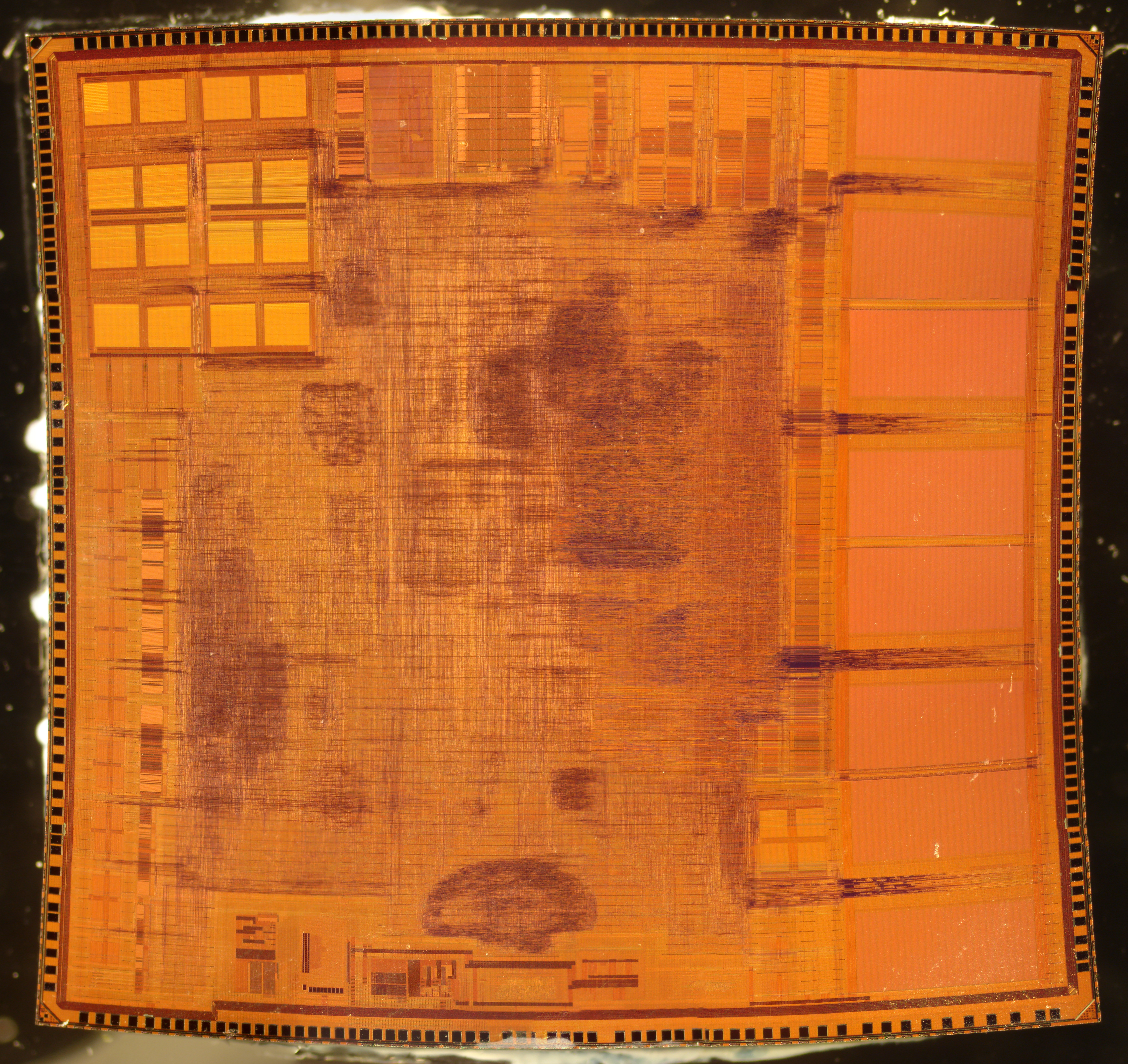 TI OMAP DM290ZWV $4-66A9Y2W E1